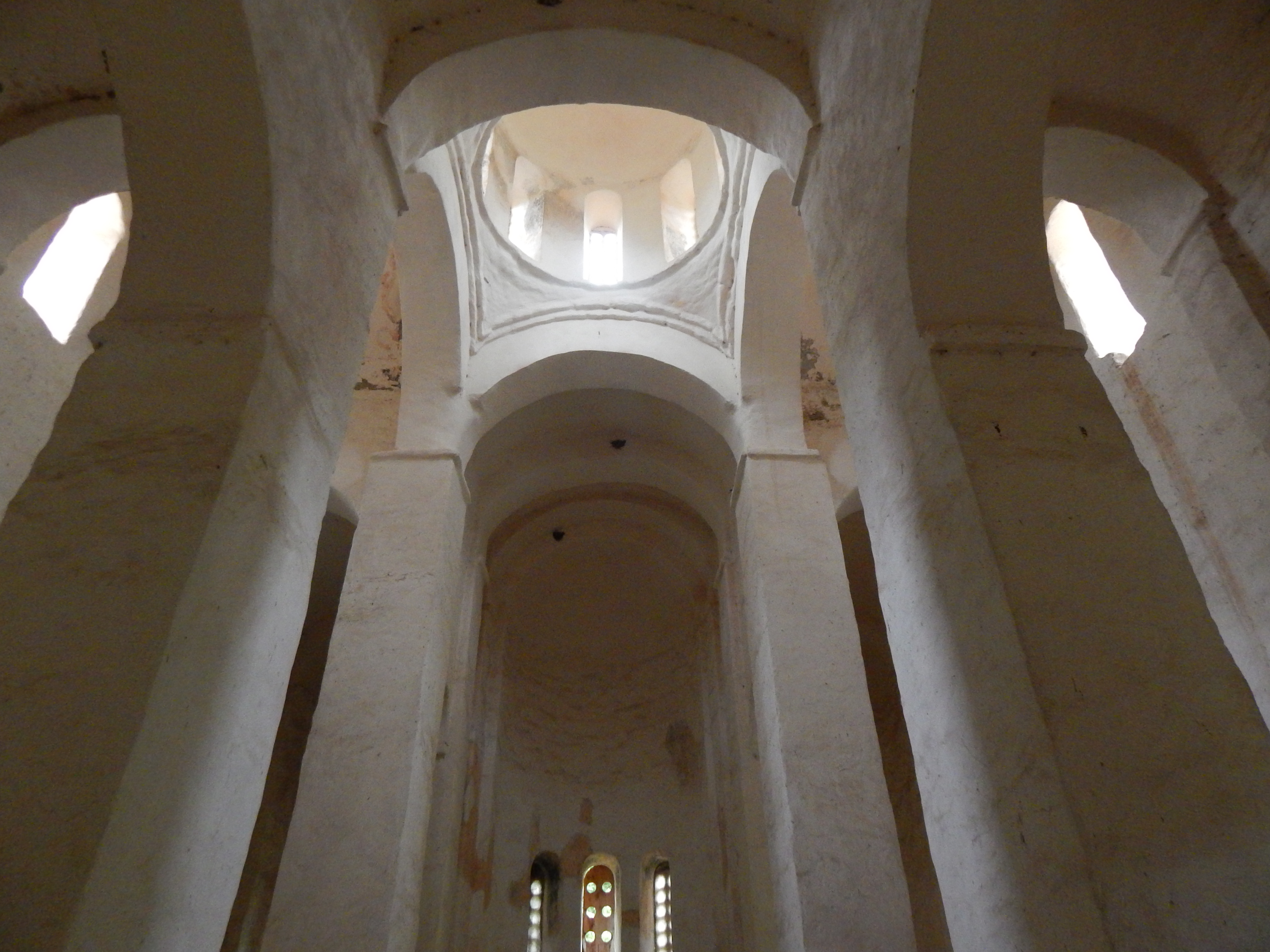 Нижне-Архызское городище. Северный храм. Подкупольное пространство